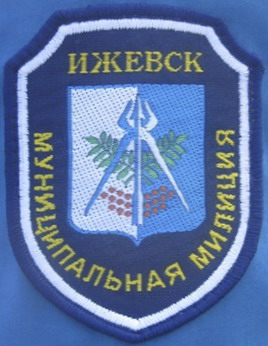 Нашивка на форме сотрудников муниципальной милиции Ижевска